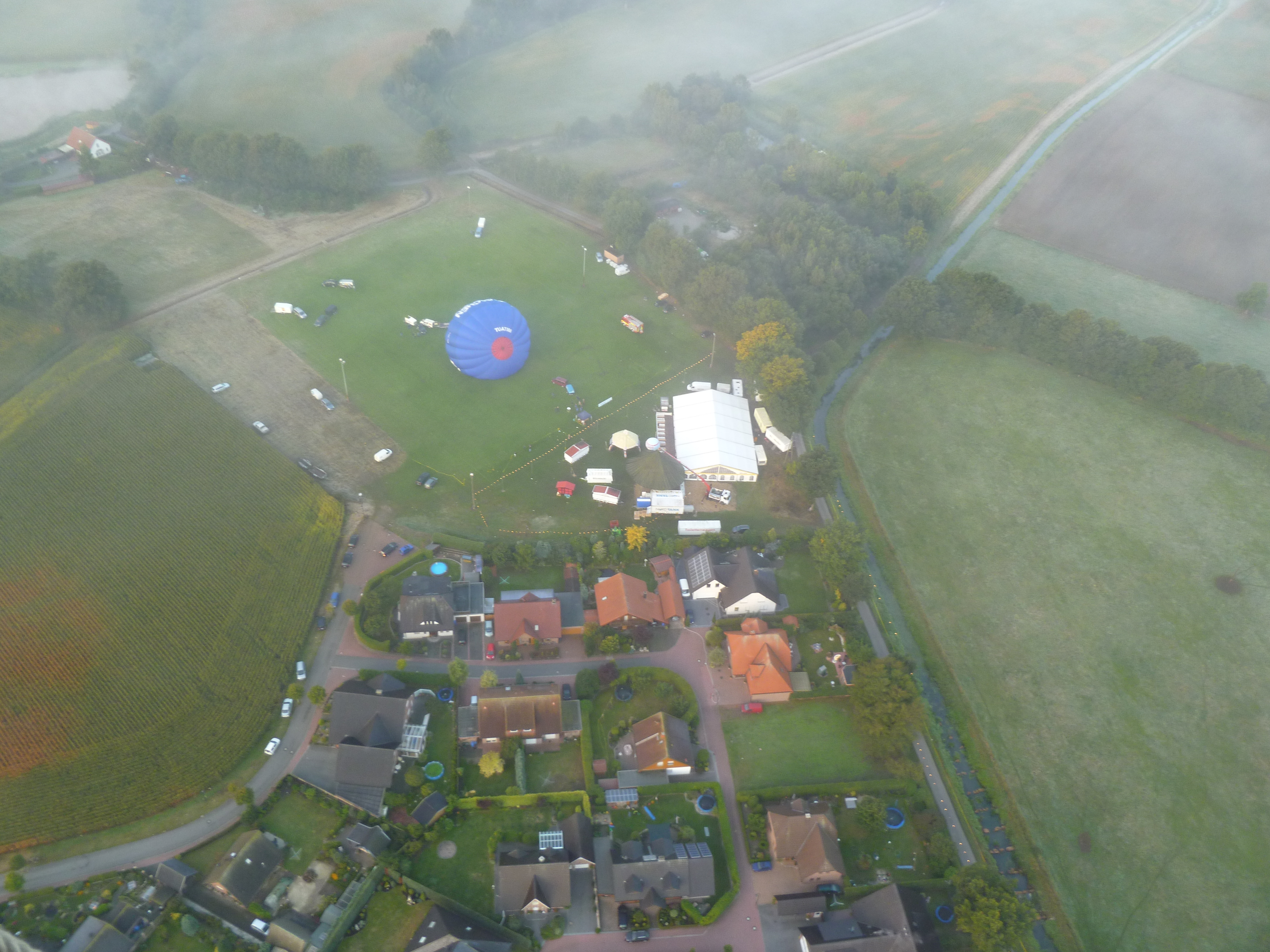 Ballonfest Halverde Morgenstart. Sportplatz West mit noch nicht gestartetem Ballon und Festzelt.